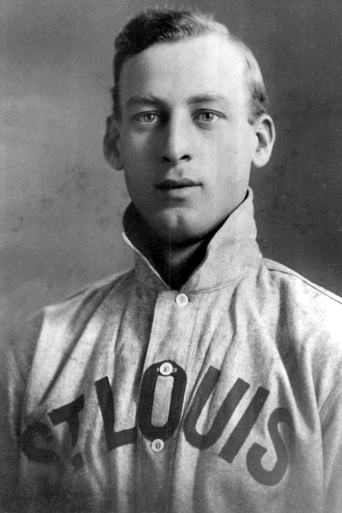 Bill Ludwig